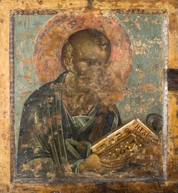 Ο Άγιος Ιωάννης ο Θεολόγος Β΄ μισό 14ου αι. Βέροια, Μικροί Άγιοι Ανάργυροι